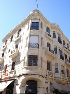 F A C: Fachada de la sede de la Fundación de Arte Contemporáneo, Montevideo, Uruguay.